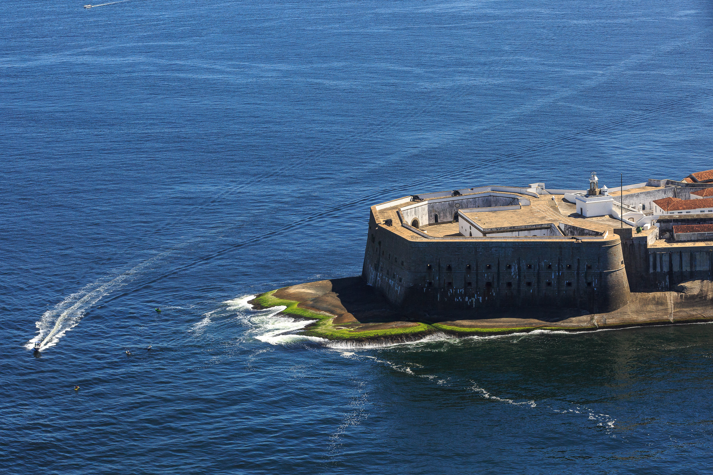 Vista aérea da Fortaleza de Santa Cruz da Barra na cidade de Niterói